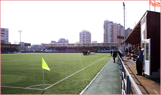 Стадион "Новые Химки"